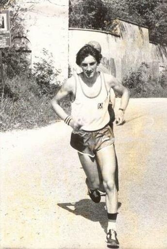 Orlando Pizzolato during a trining in Italy in 1980s